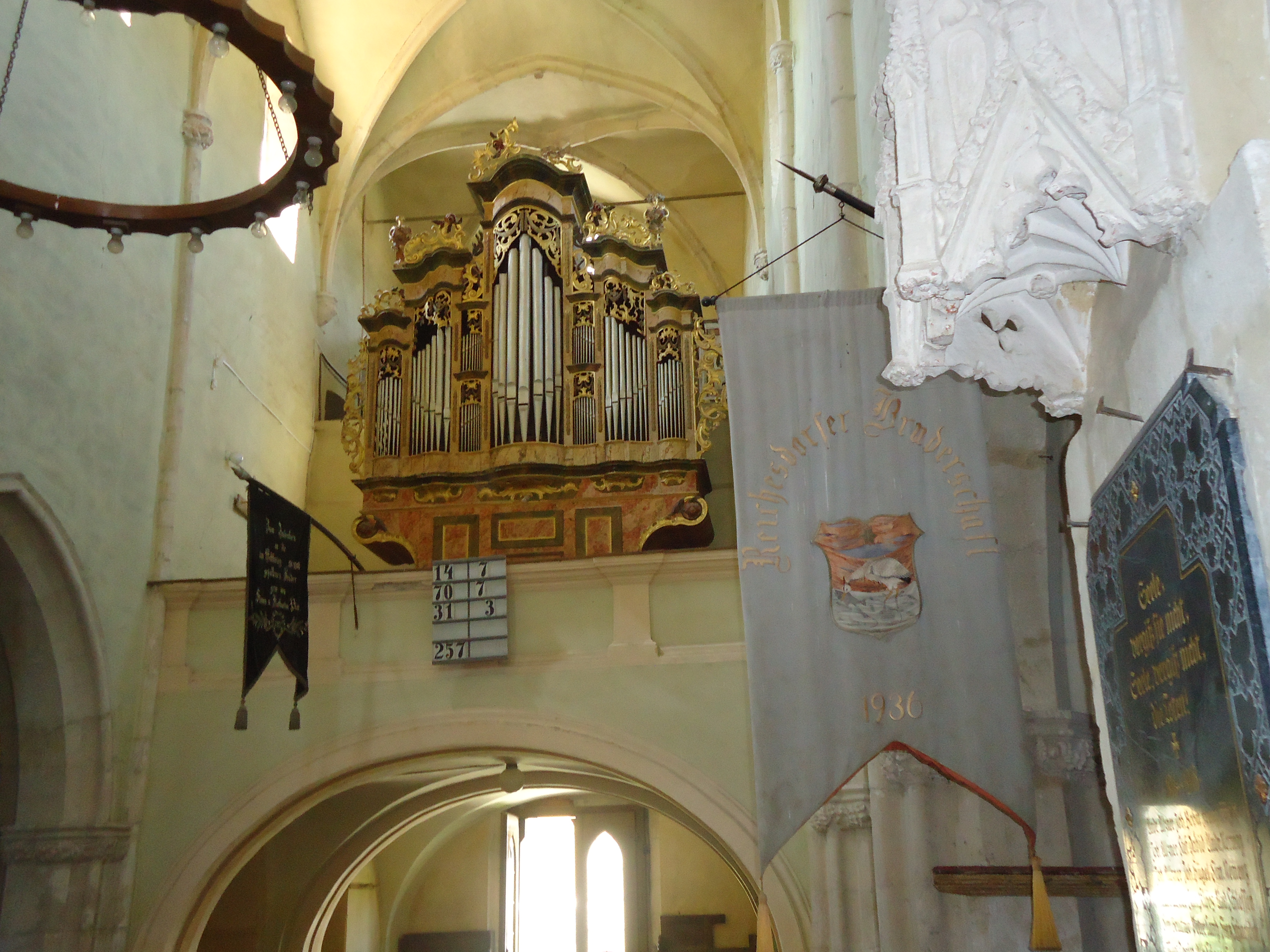 Interiorul bisericii fortificate din Richis